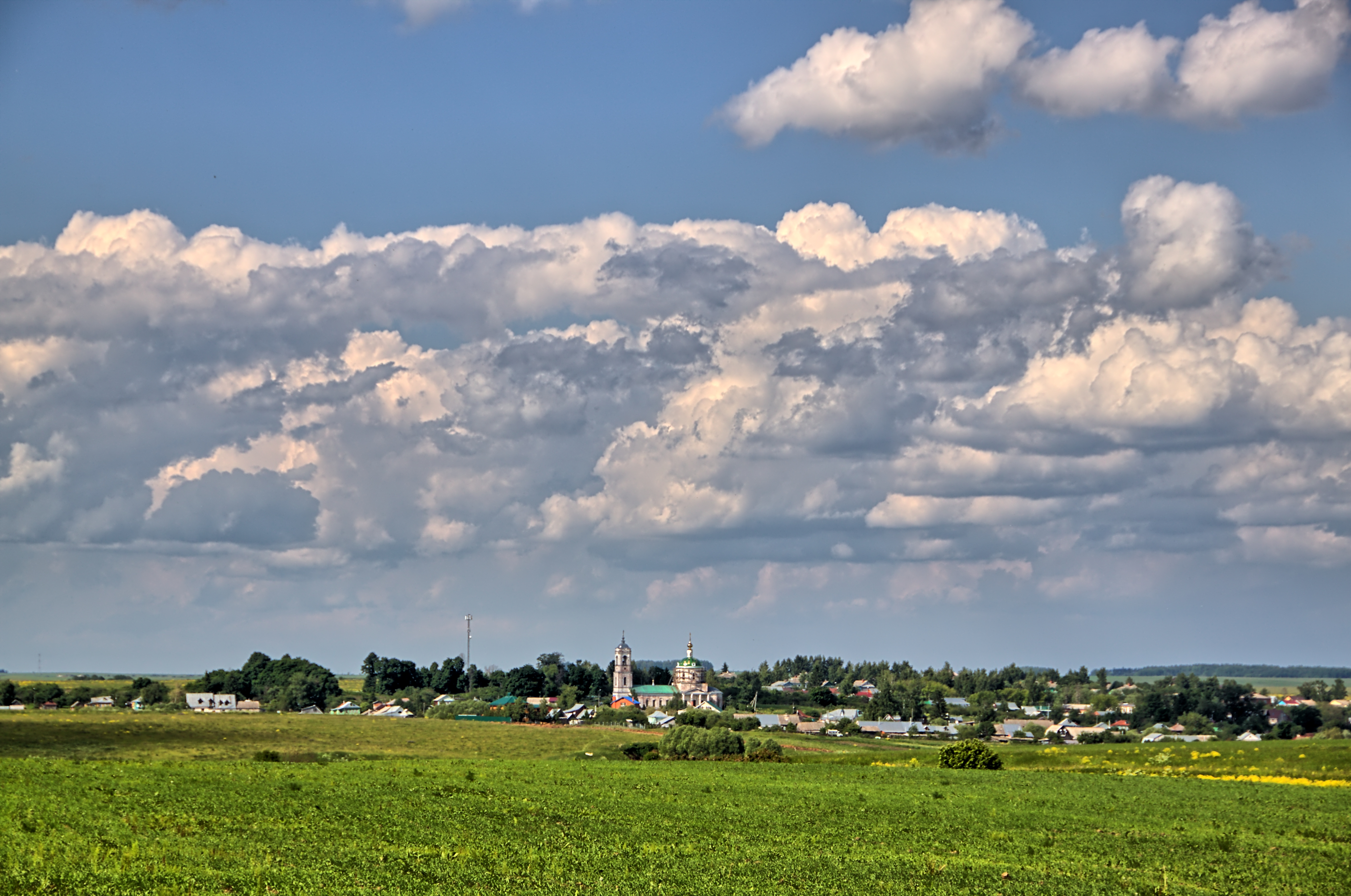 Борисовское